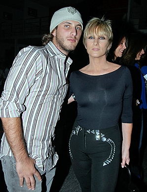 Argentina-Mexico